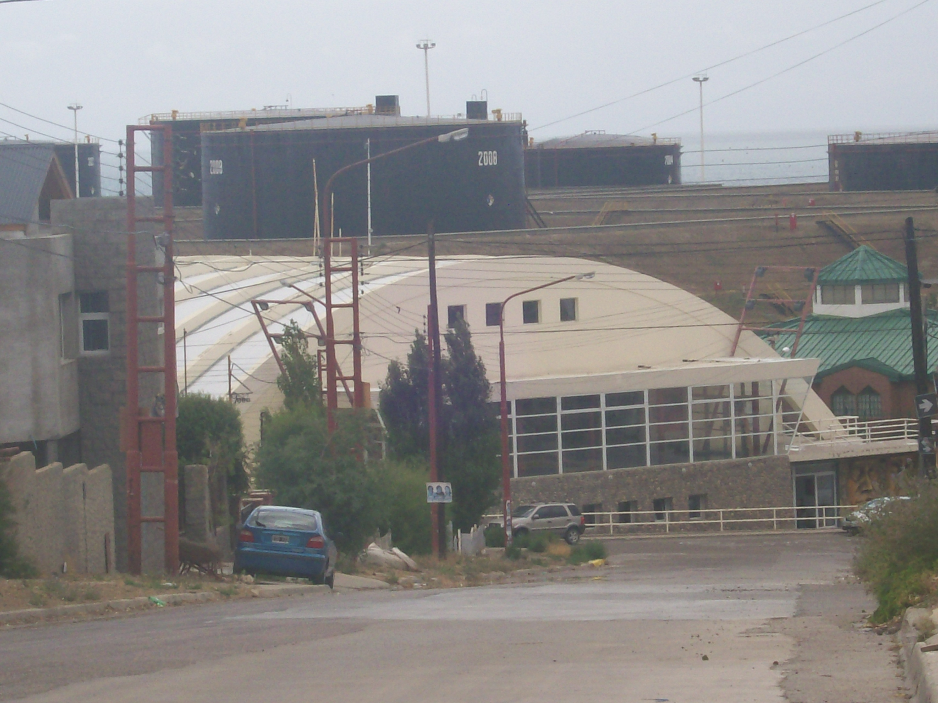 vista al cine desde Deocarets